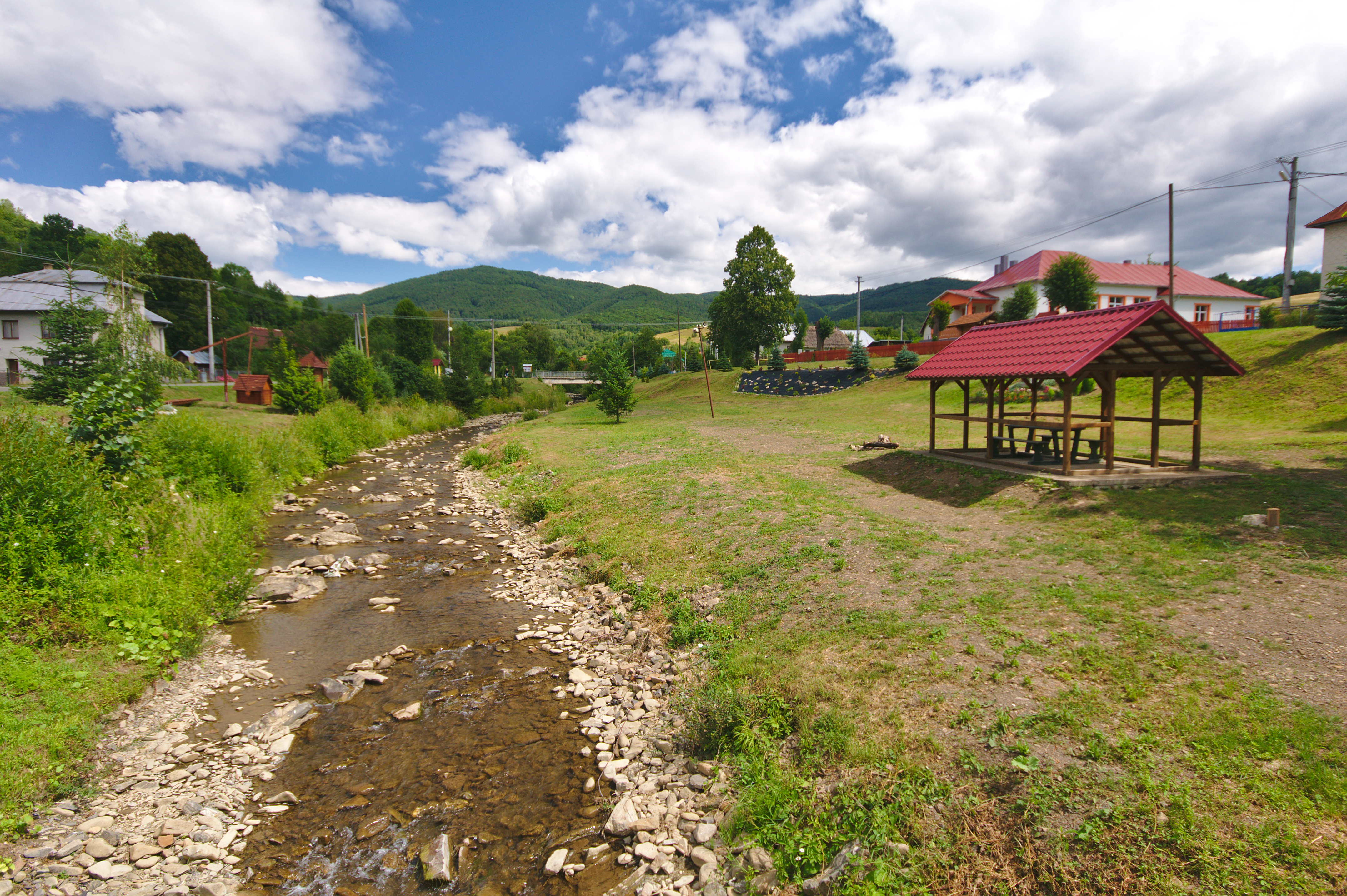 Zbojský potok, Nová Sedlica, okres Snina